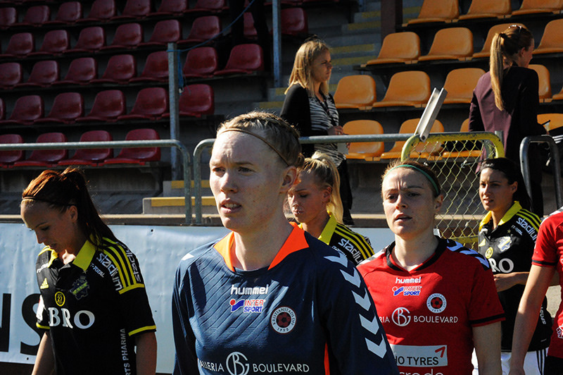 Kristianstads DFF goalkeeper Hedvig Lindahl in May 2014